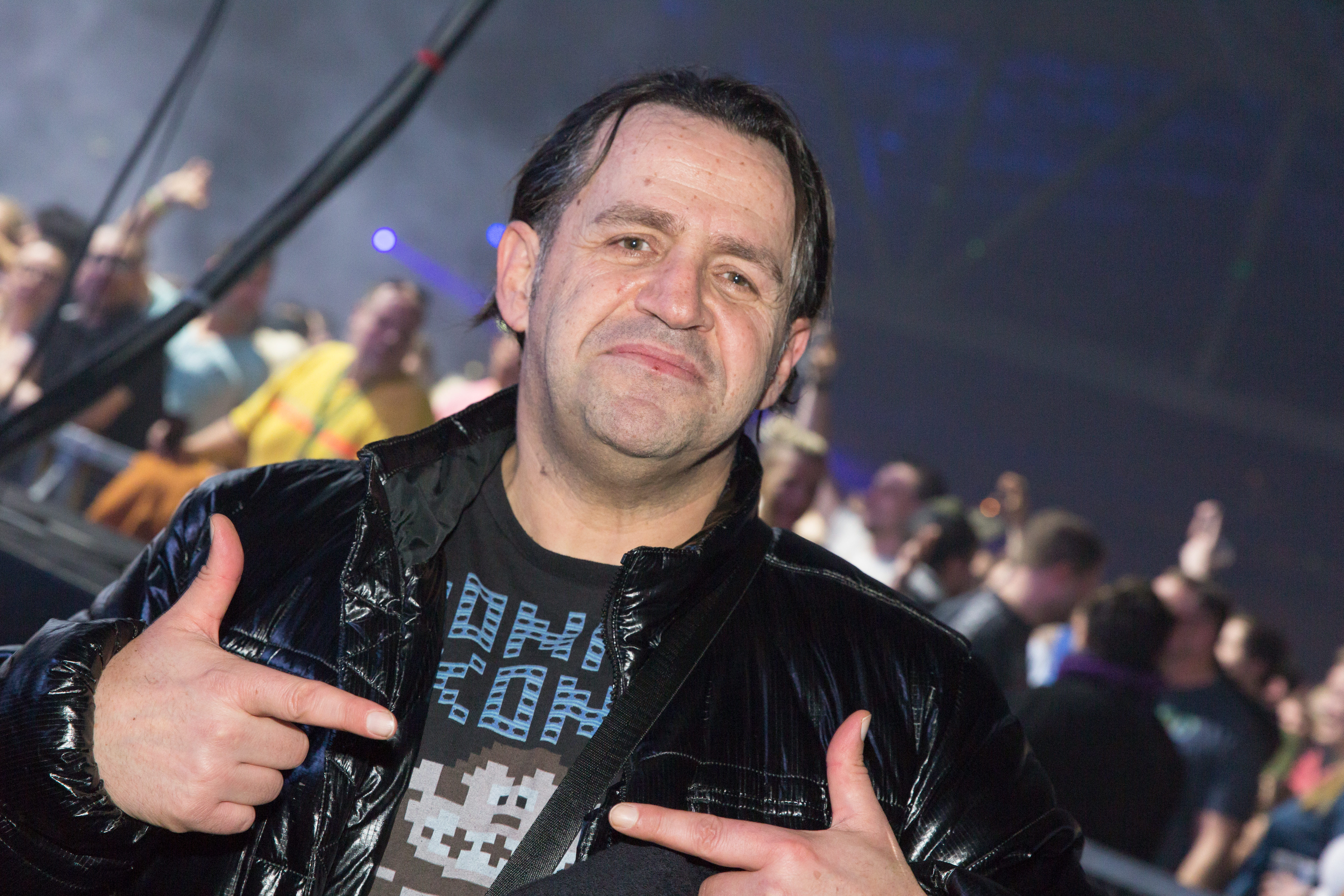 DJ Quicksilver auf dem 90er Rave, Festival für Technomusik der 90er Jahre. Die Veranstellung fand in der Arena Berlin am 11.02.2017 statt. Dieses Bild wurde mit zustimmung und Akkeditierung des Veranstallter BM Eventagentur UG (haftungsbeschränkt) erstellt.